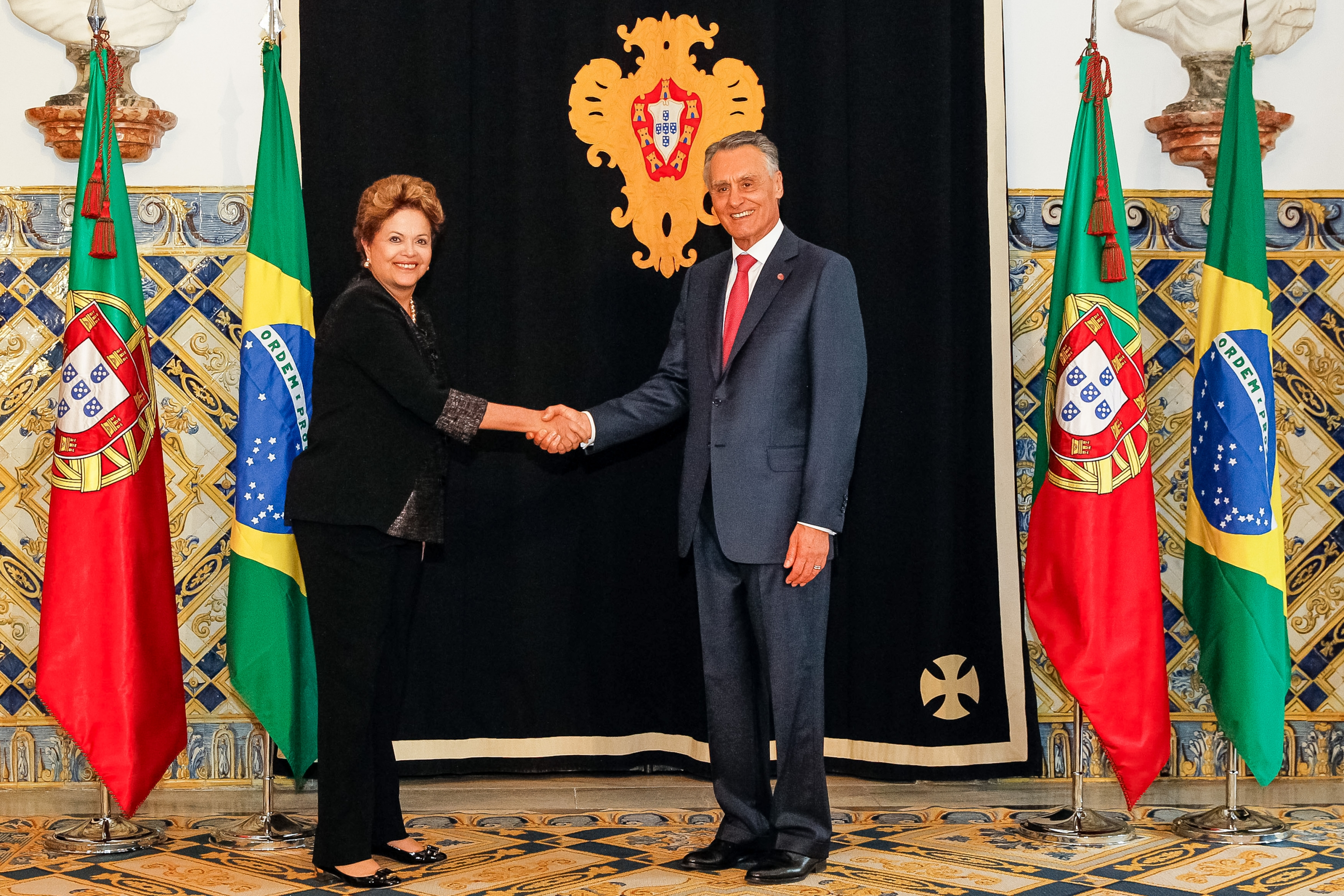 Presidenta Dilma Rousseff durante encontro bilateral com o senhor Aníbal Cavaco Silva, Presidente de Portugal, no Palácio de Belém.